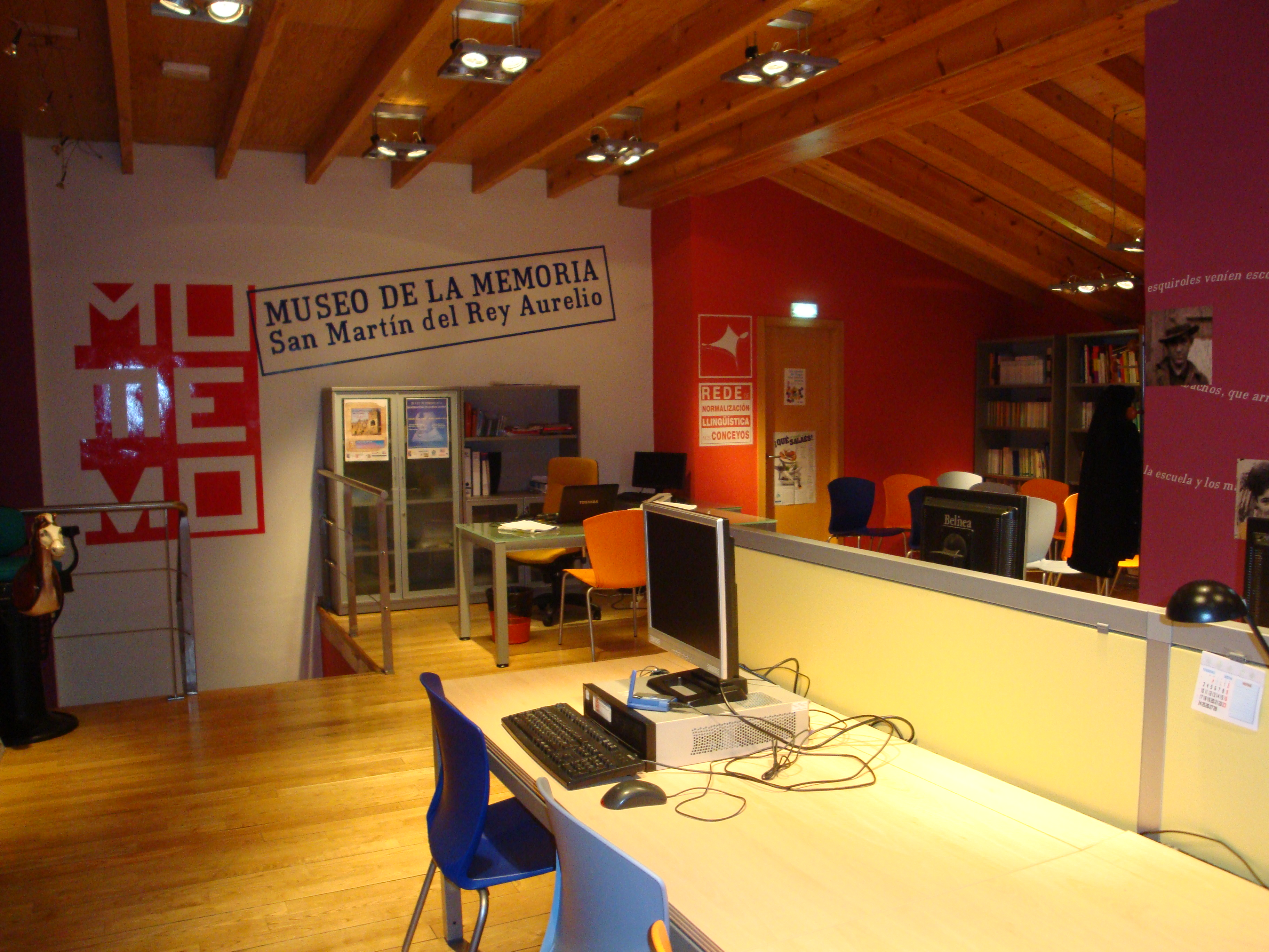 Interior de la Casona del Bravial anguaño